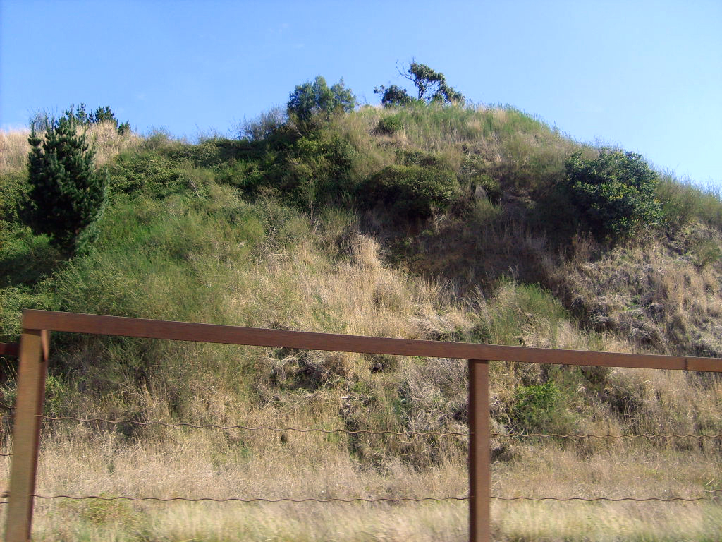 Morillo de Perales